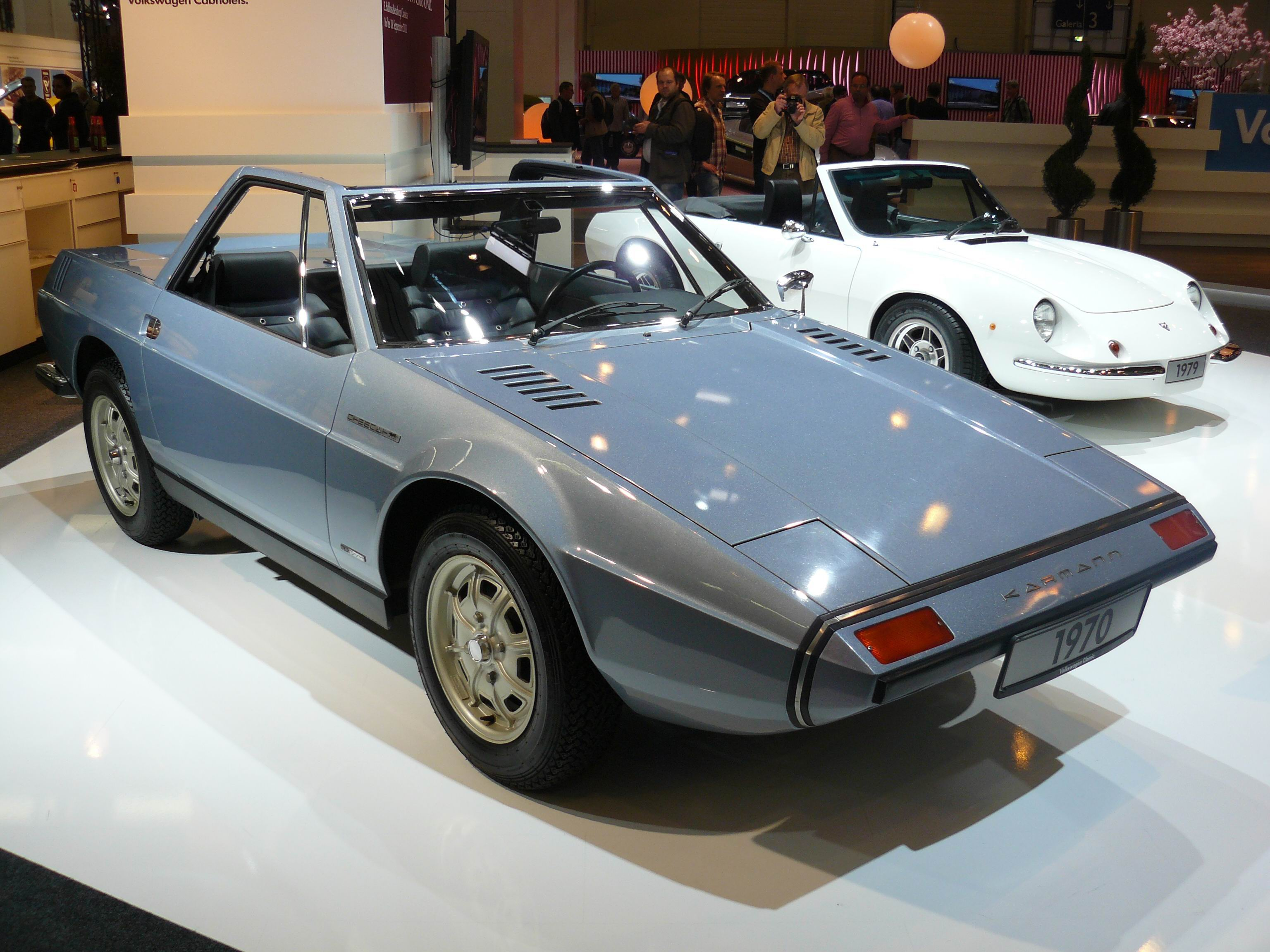 Essen 2011